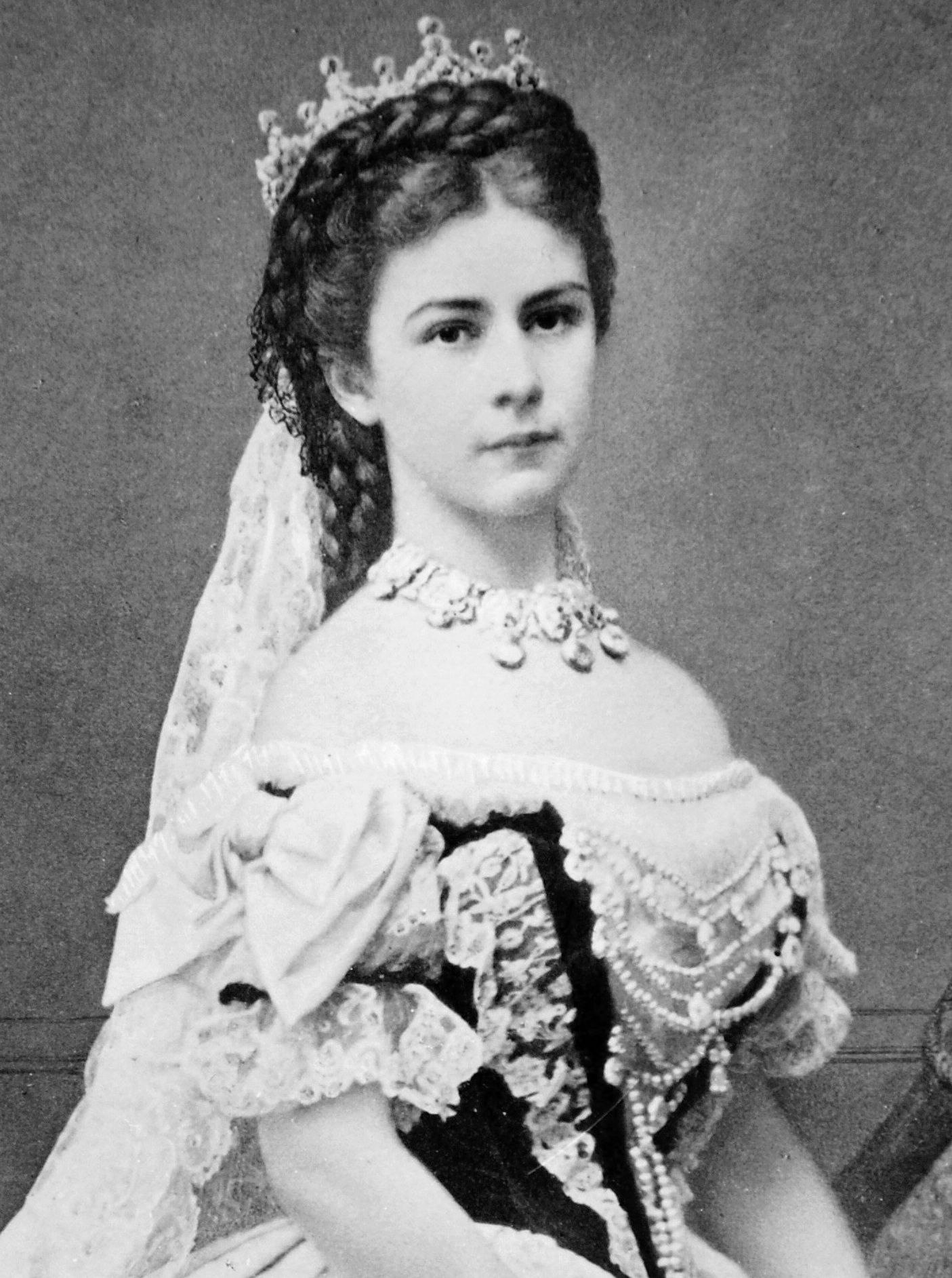 Fotografia da Imperatriz Isabel da Áustria (1837-1898)